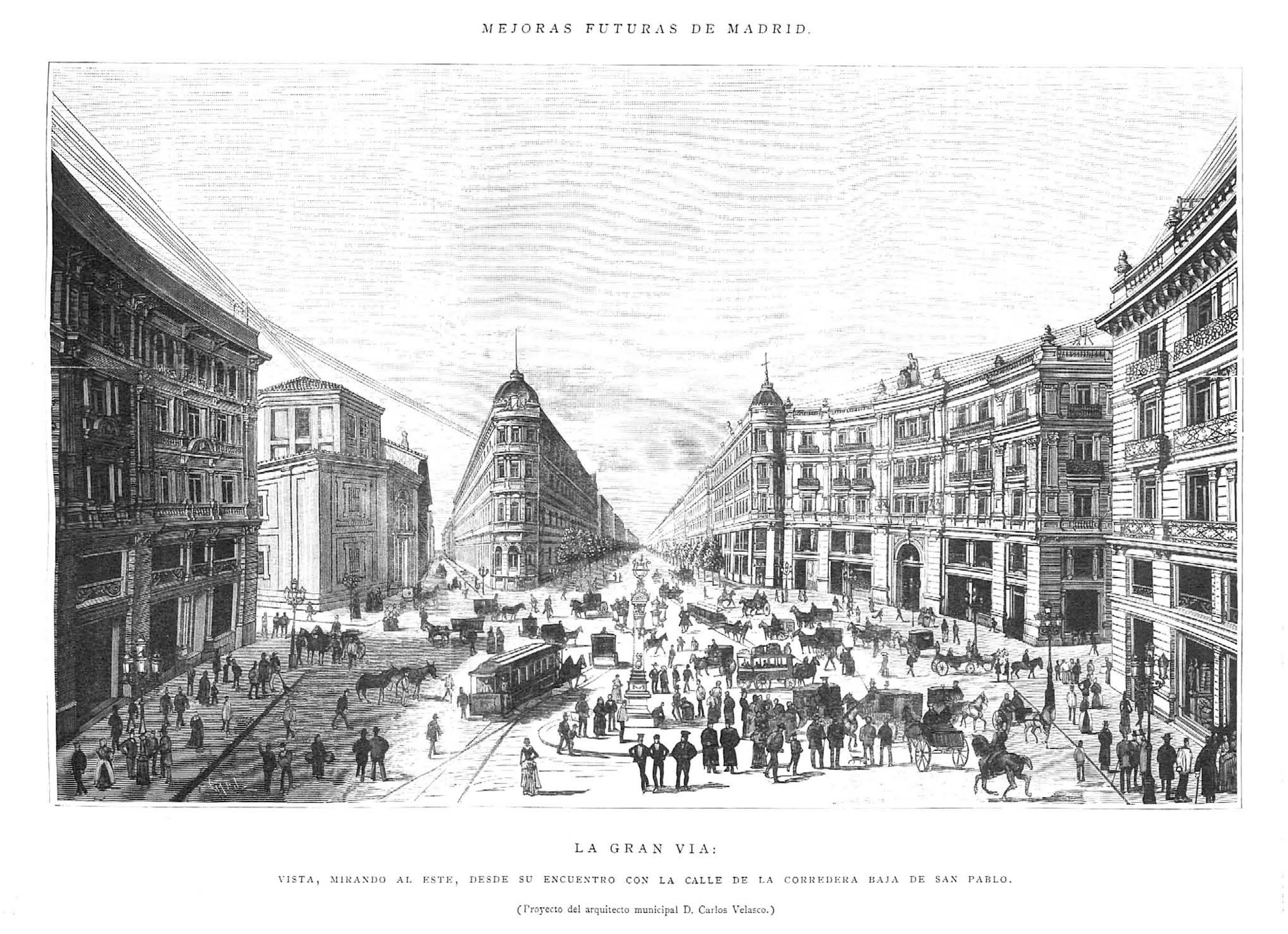 Mejoras futuras de Madrid. La Gran Vía. Vista, mirando al este, desde su encuentro con la calle de la Corredera Baja de San Pablo. (Proyecto del arquitecto municipal D. Carlos Velasco).